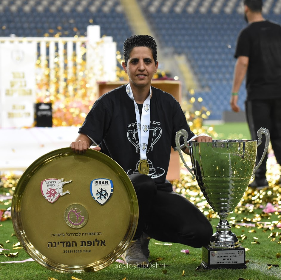 ענת מימוני עם צלחת האליפות וגביע המדינה לעונת 2018/2019, בהם זכתה כעוזרת מאמן אס"א תל אביב